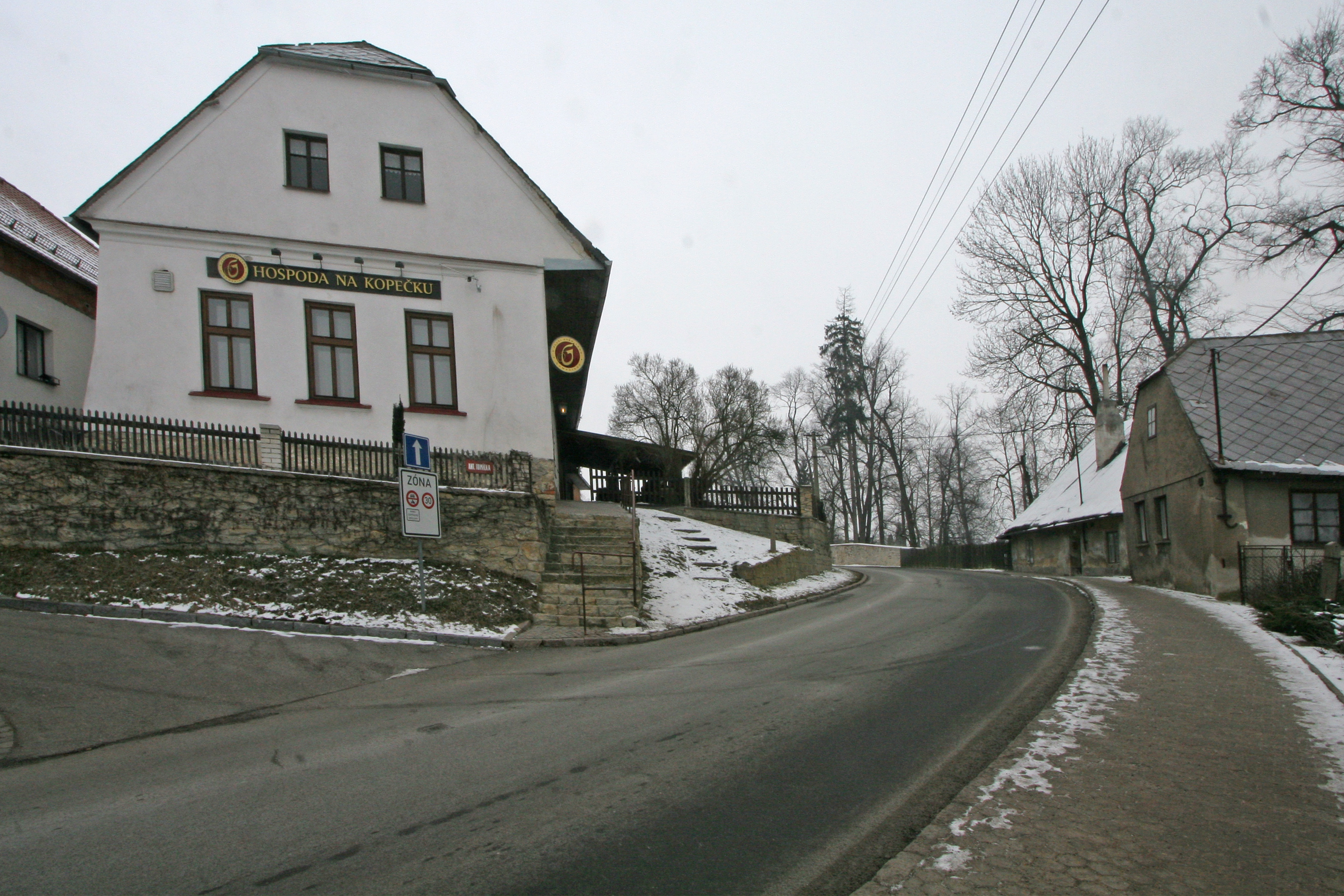 Litomyšl Záhajská čp. 22 - hospoda Na Kopečku